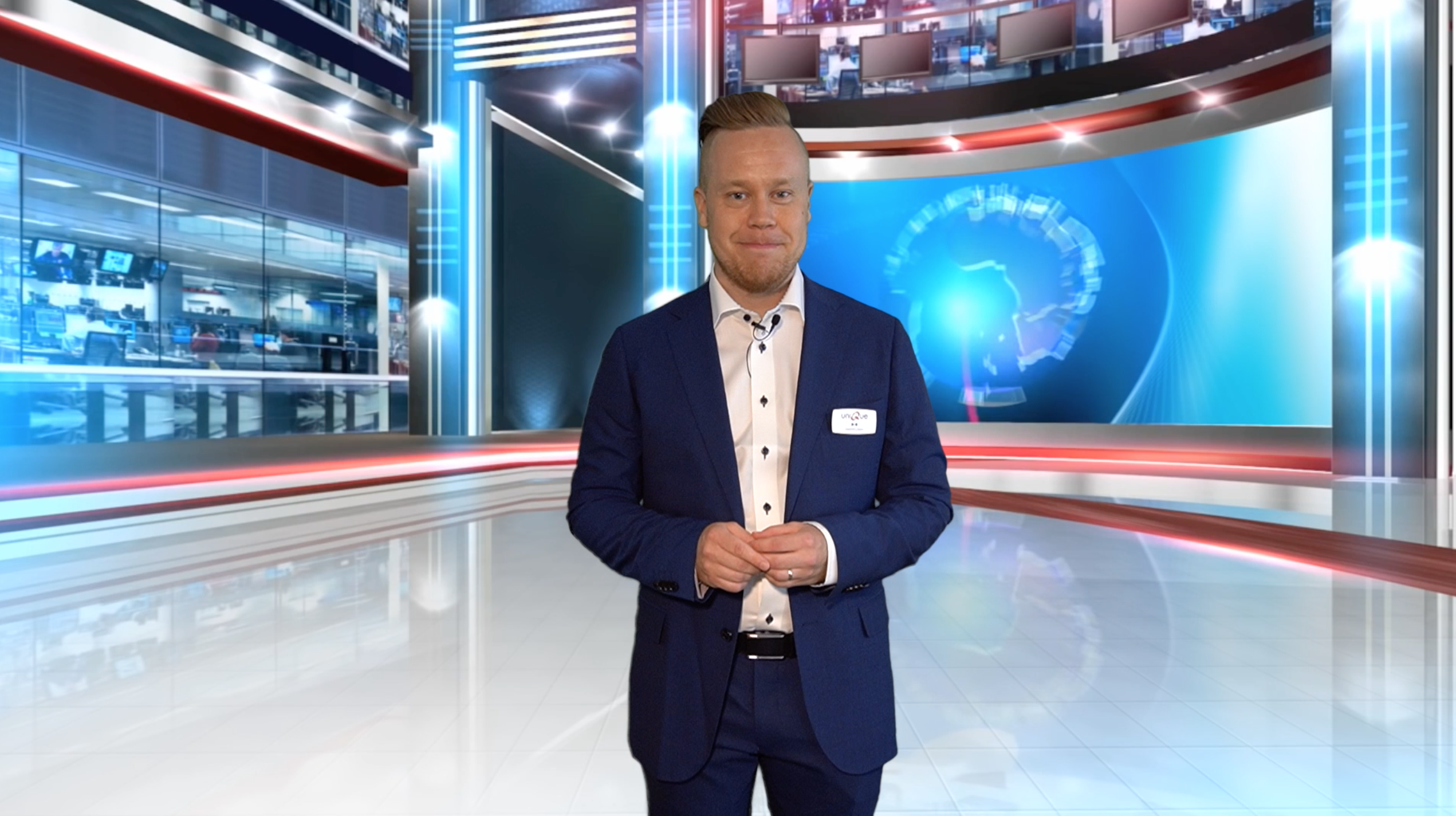 Aleksis Ärje juontamassa Pesisuutiset-lähetystä.